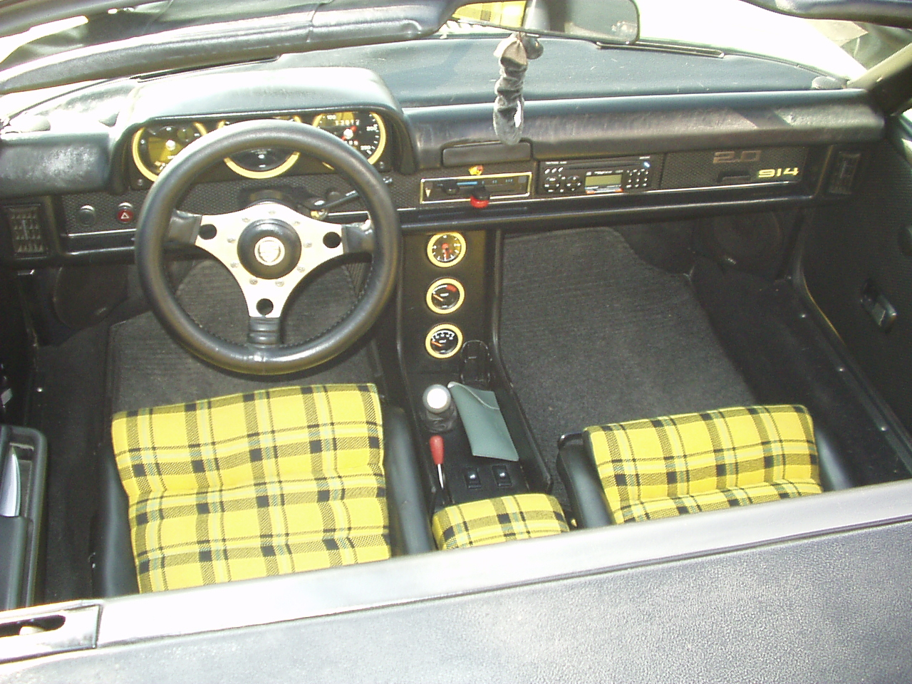 Blick auf das Cockpit eines Porsche 914